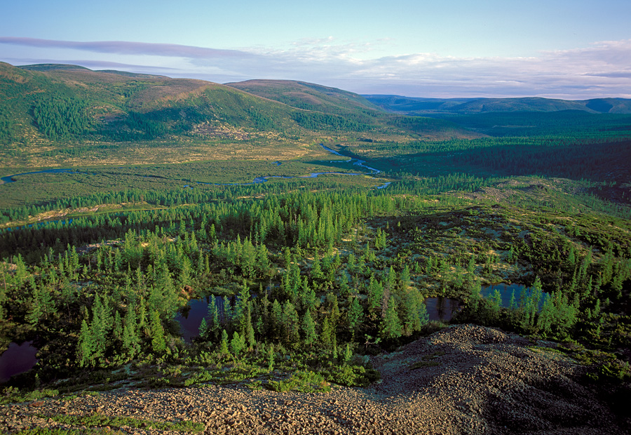 Байкало-Ленский заповедник. Около 10 км от истока реки Лена.